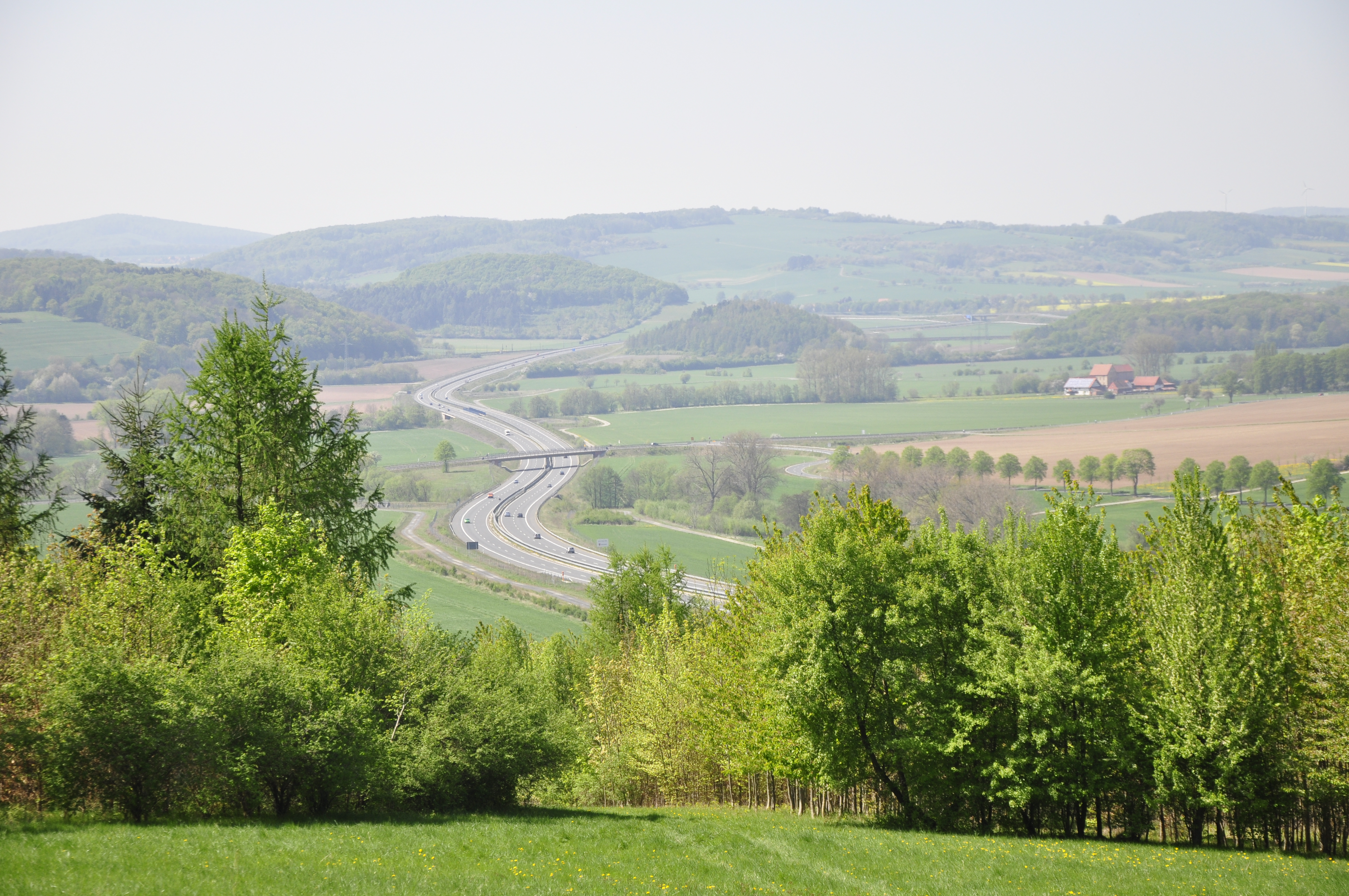 Blick auf die A 38 vom Besenhauser Pferdeberg, rechts die Mühle in Reckershausen